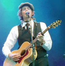 Odd Nordstoga at Drammen Elvefestival 2004. Foto: Kjersti Magnussen